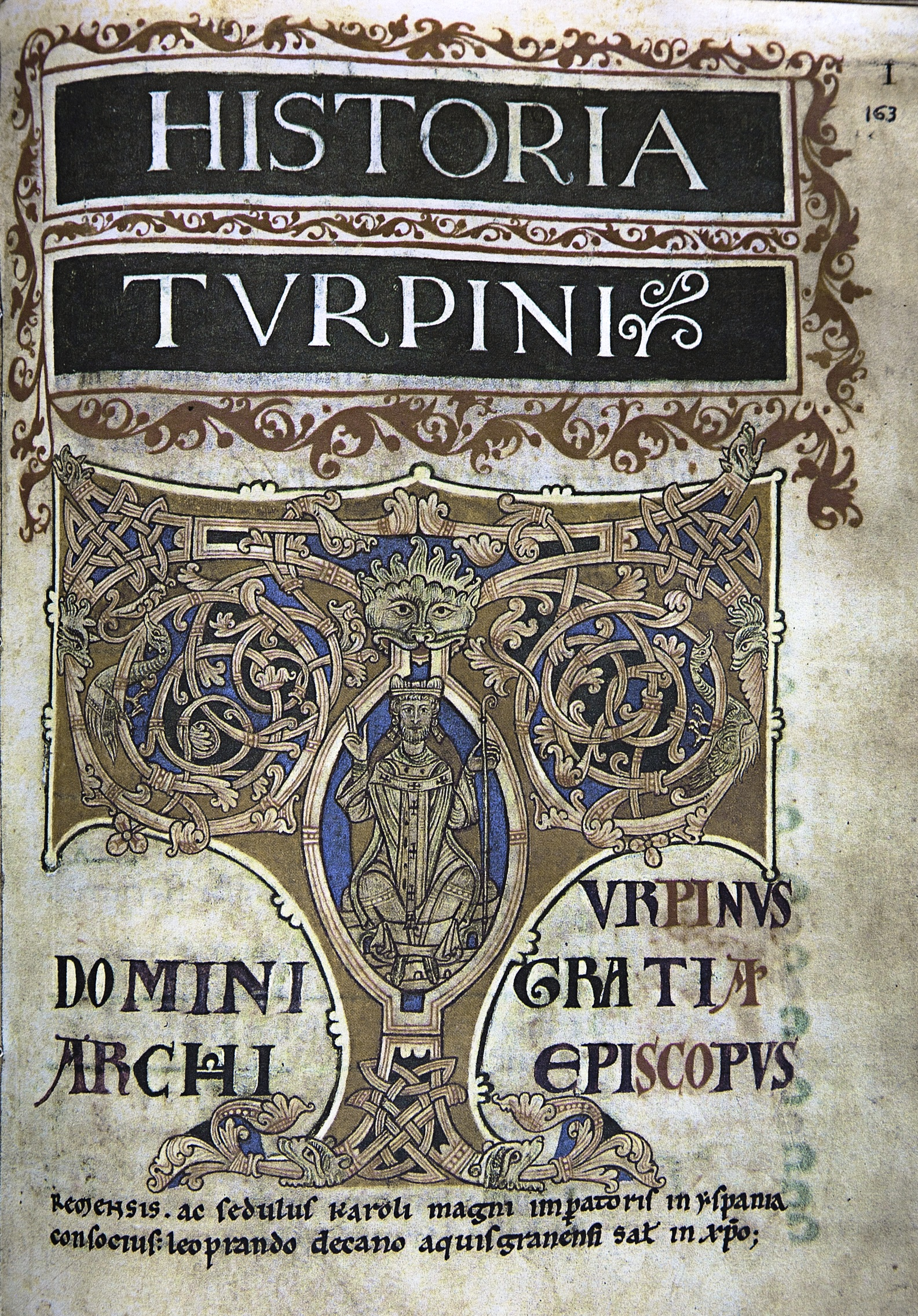 Codex Calixtinis